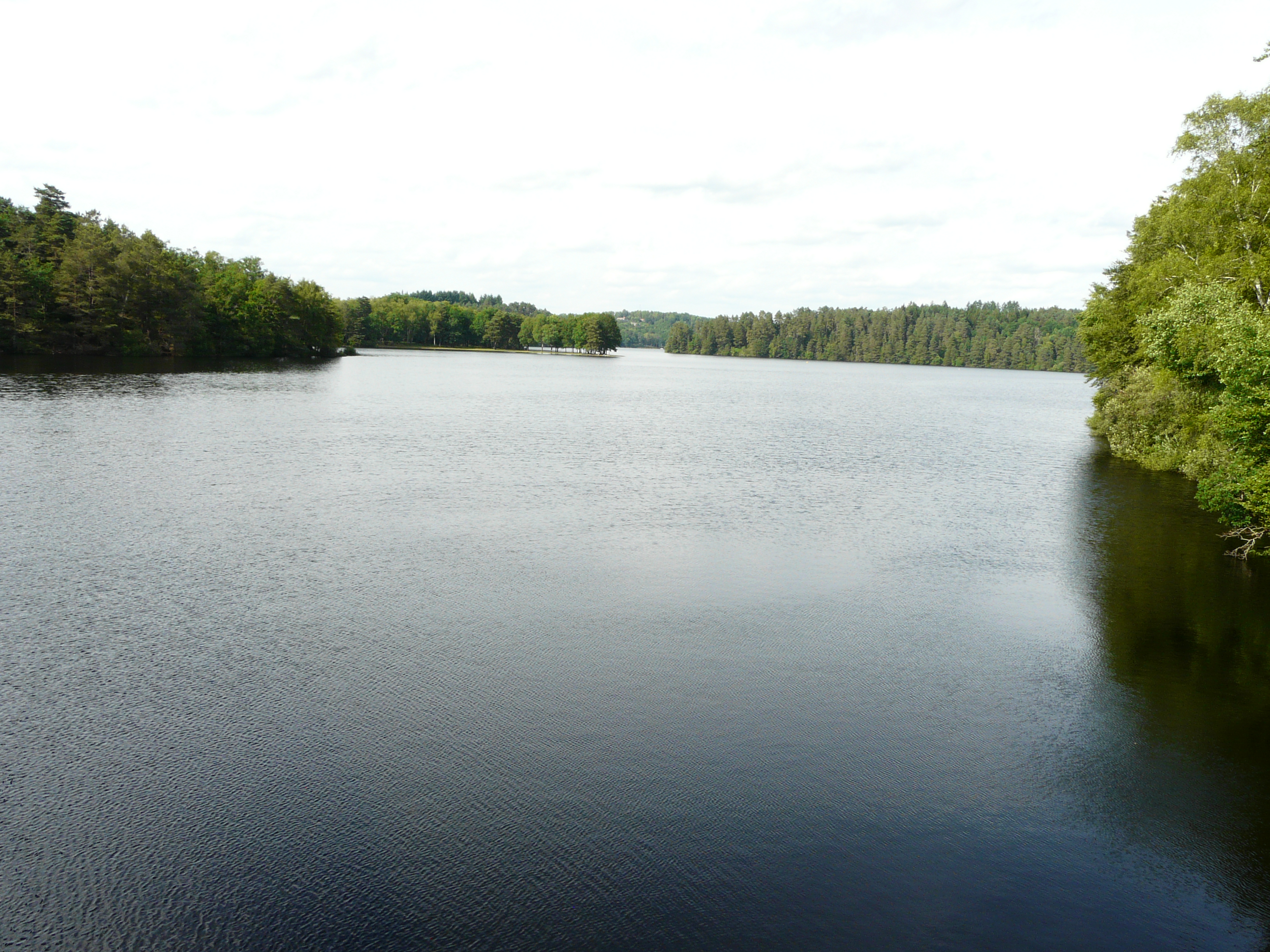 La retenue du barrage de la Valette juste en amont du barrage, entre les communes de Marcillac-la-Croisille à gauche, et Saint-Pardoux-la-Croisille à droite, Corrèze, France.